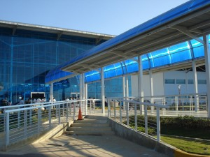 Terminal de Pasajeros de la Ciudad de Punto Fijo, Falcon, Venezuela.